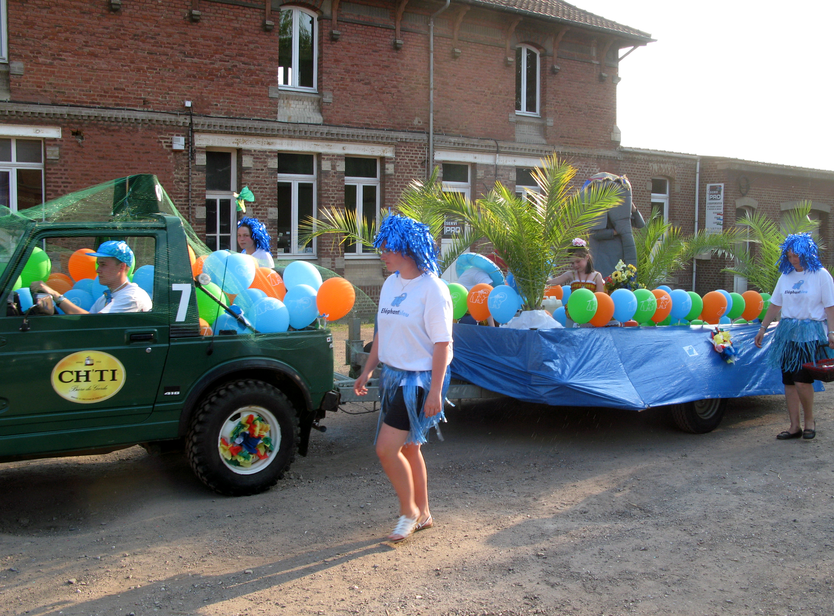 Doullens (Somme, France) - Vers 19 h 20, les tout premiers chars, musiciens et associations participant au Carnaval d'été ont commencé à défiler. Au point de rassemblement, dans la cour de l'ancienne usine Sueur, d'autres groupes terminent les ultimes préparatifs et se positionnent selon l'ordre prévu pour le cortège. Le "char de l'Eléphant Bleu" a manifestement prévu un stock de ballons de baudruche à distribuer aux enfants présents sur le parcours. .